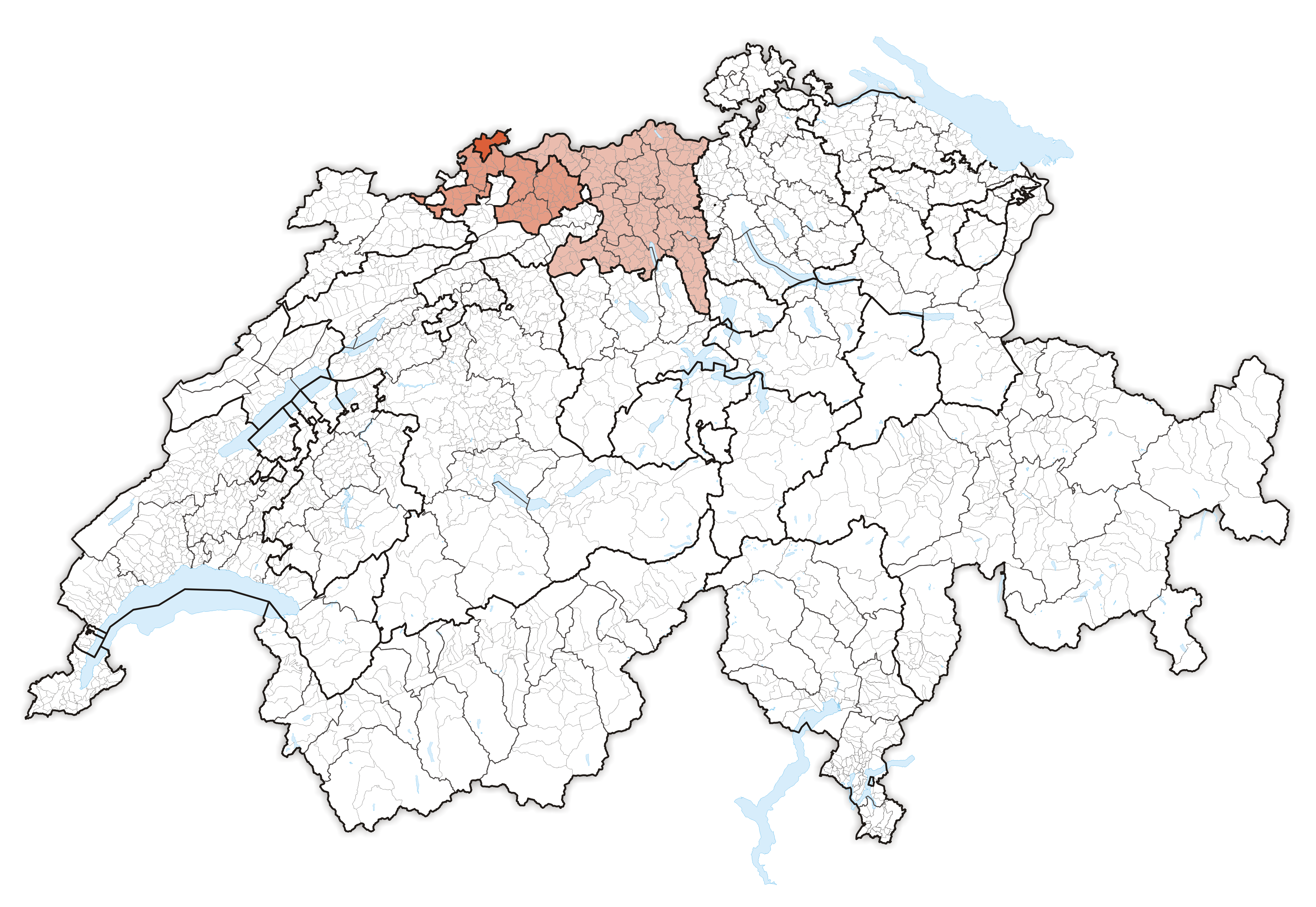 Large regions in Switzerland